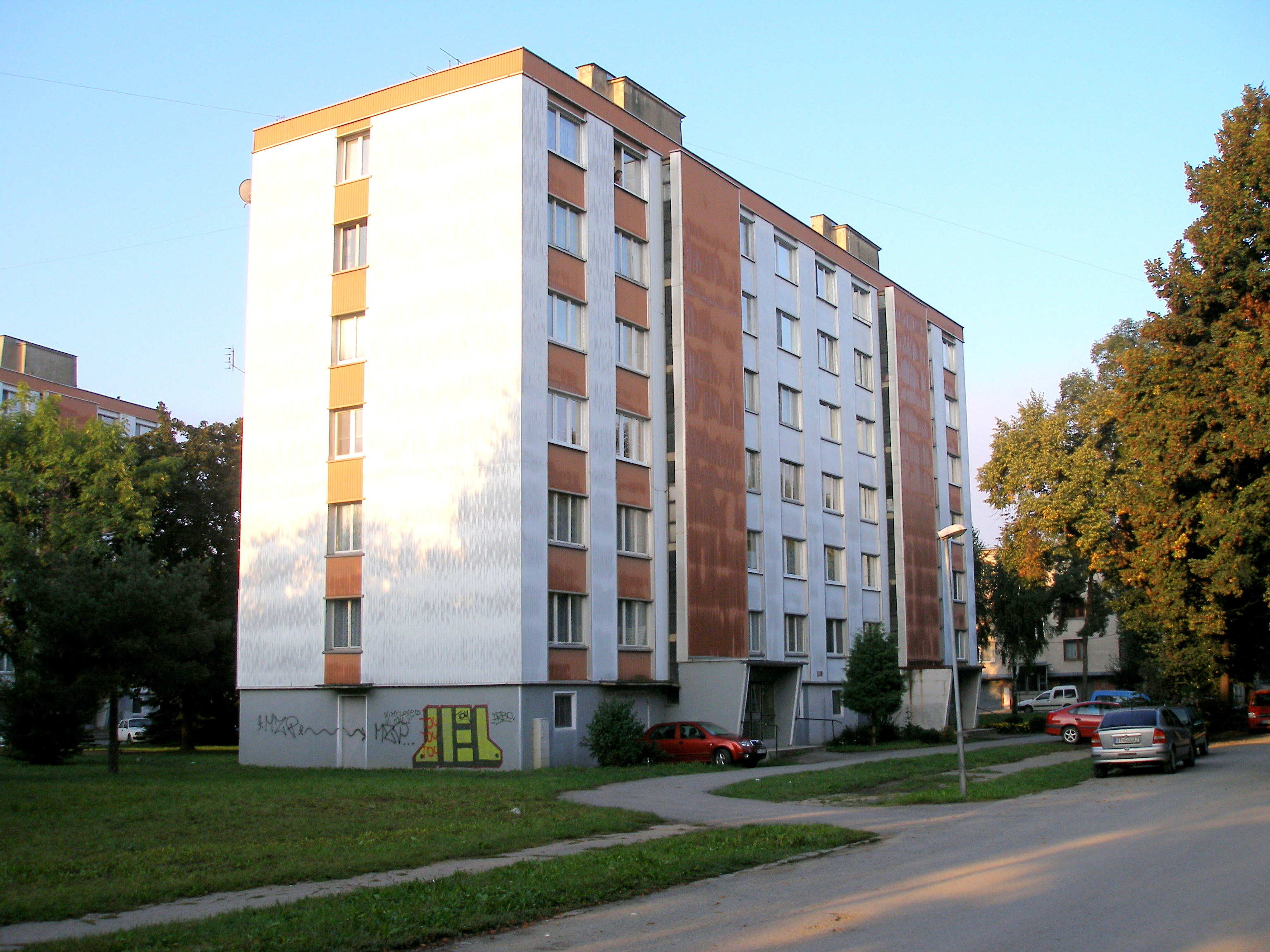 Ulica Sídlisko duklianskych hrdinov v meste Prešov